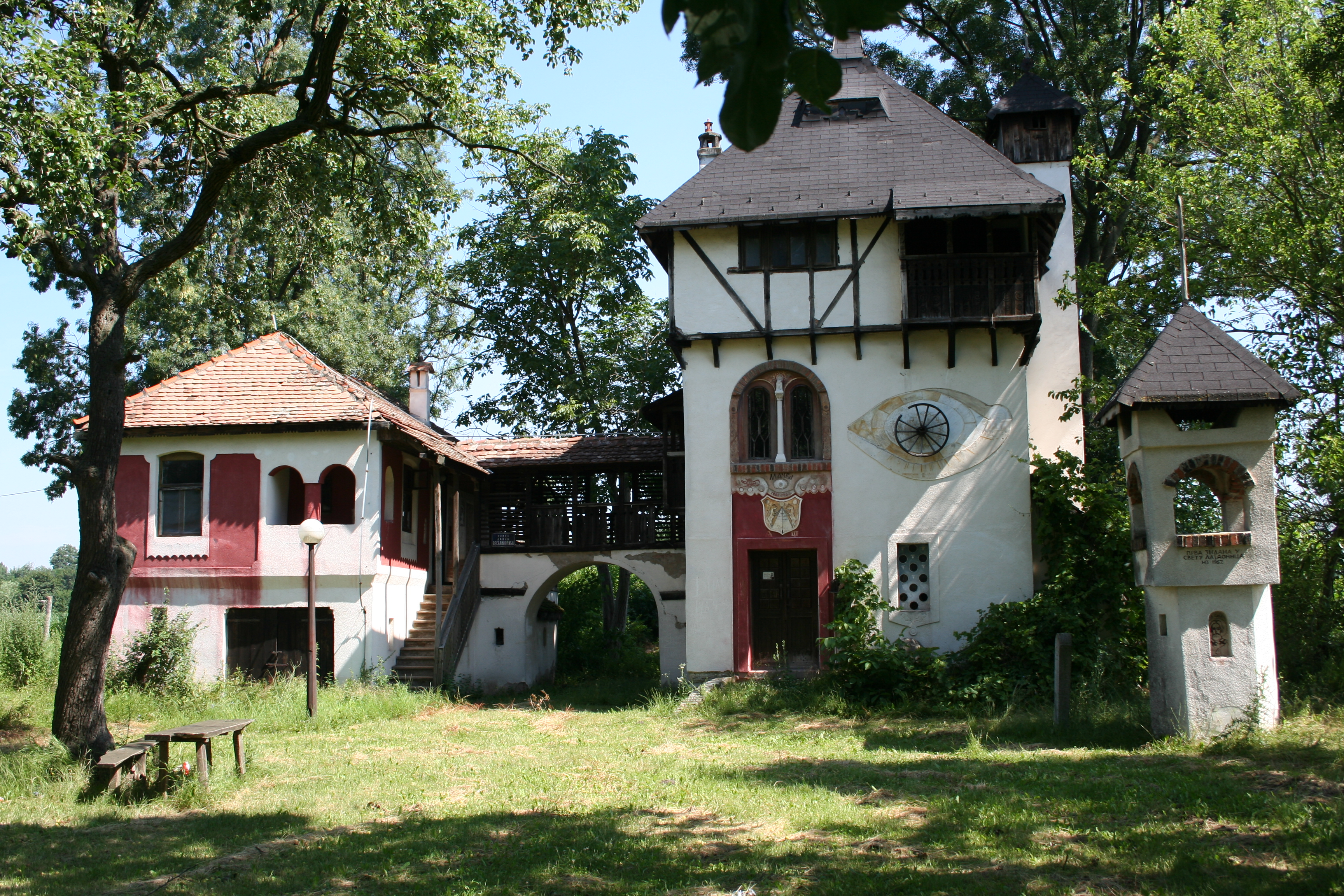 Radovan-kula Milića od Mačve, Mačvanski Belotić